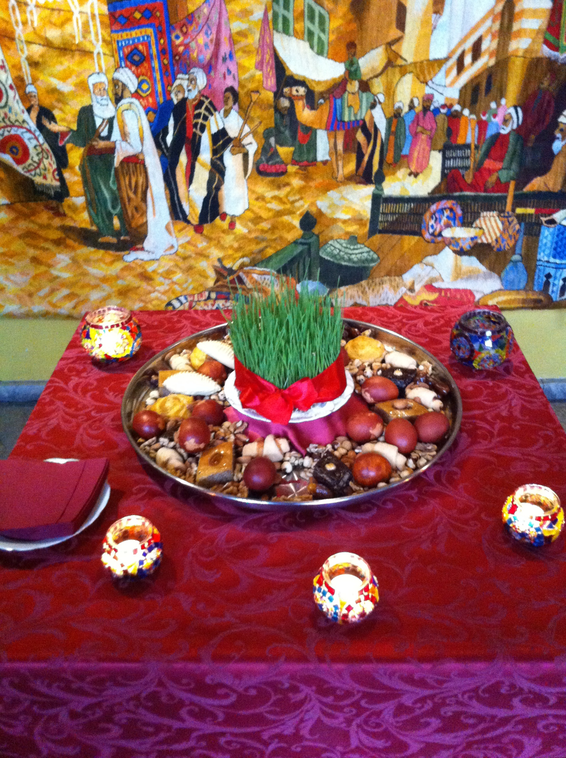 Праздничный стол в честь исламского праздника "Новруз-Байрам"